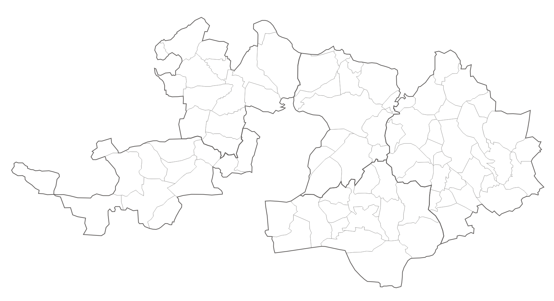 Municipalities in Canton Basel Country/ Gemeinden des Kantons Basel-Landschaft